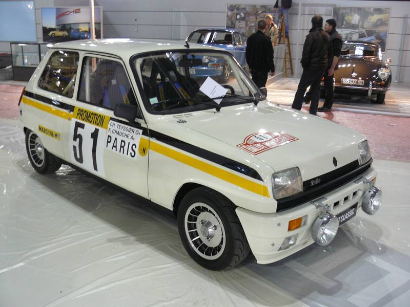 Français cadien: Retromobile 2012